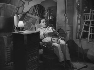 Fonte: Dal film Totò e le donne Licenza d'uso